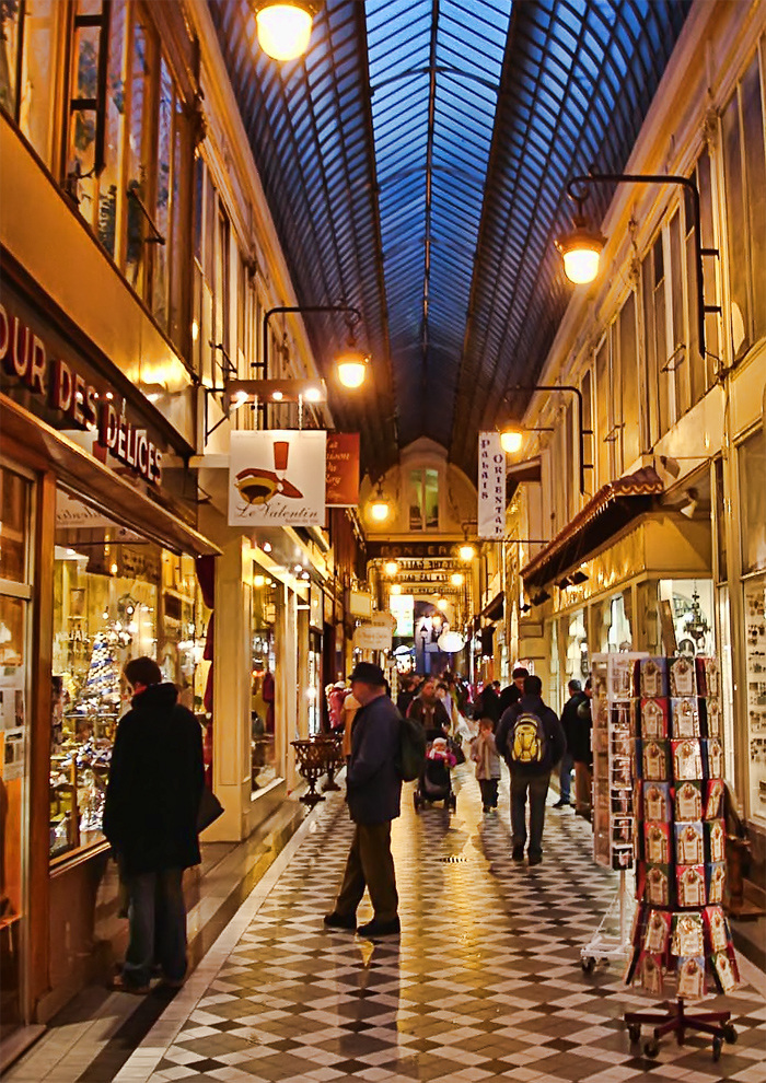 Le passage Jouffroy à Paris (France)